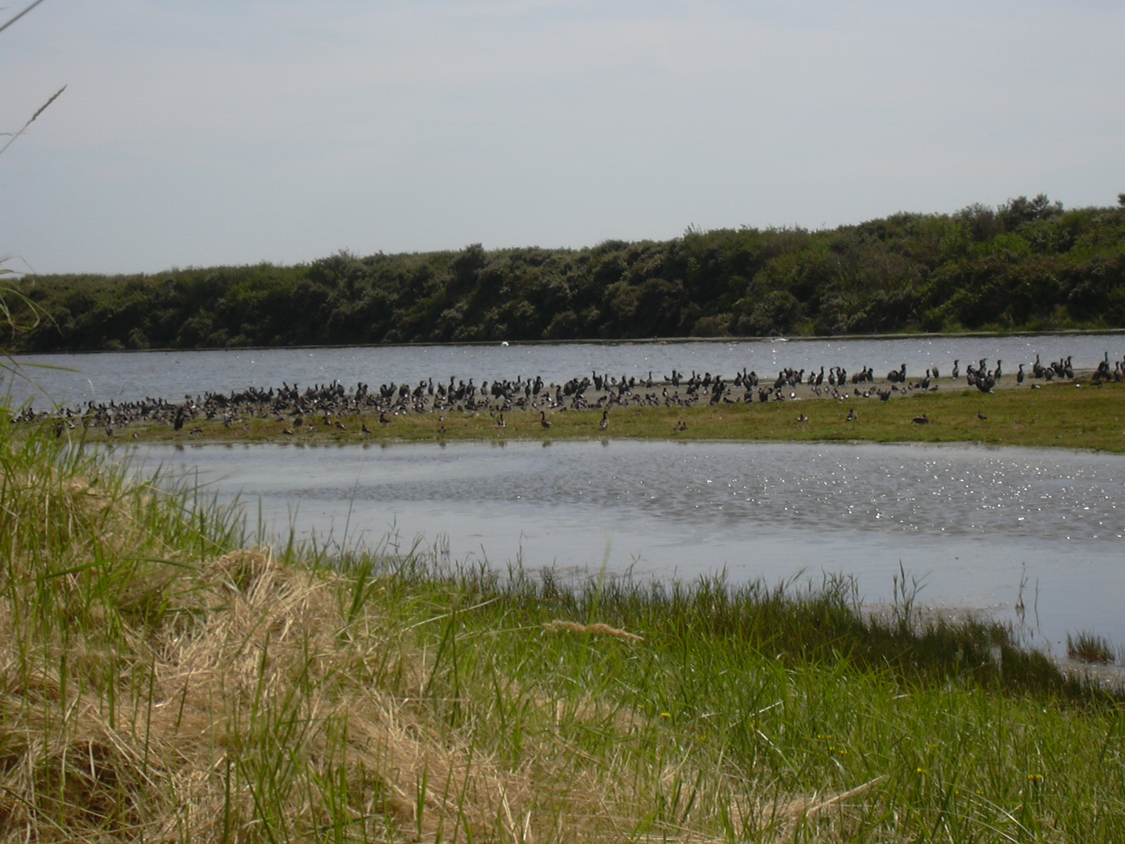 Parc du Marquenterre, Picardie/France; island with cormorants.